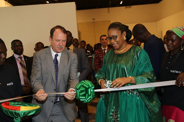 L’ambassadeur des USA au Mali, Paul Folmsbee, à droite, et la ministre de la Culture du Mali N'Diaye Ramatoulaye Diallo ont procédé au lancement officiel du site internet et au vernissage de l’exposition issue des archives de cinq photographes professionnels du Mali à savoir Malick SIDIBE, Adama Kouyate, Tidiani Sitou, Abdourahmane Sakaly et Mamadou Cisse, Bamako, Mali, 16 mai 2017. (VOA/Kassim Troaré)